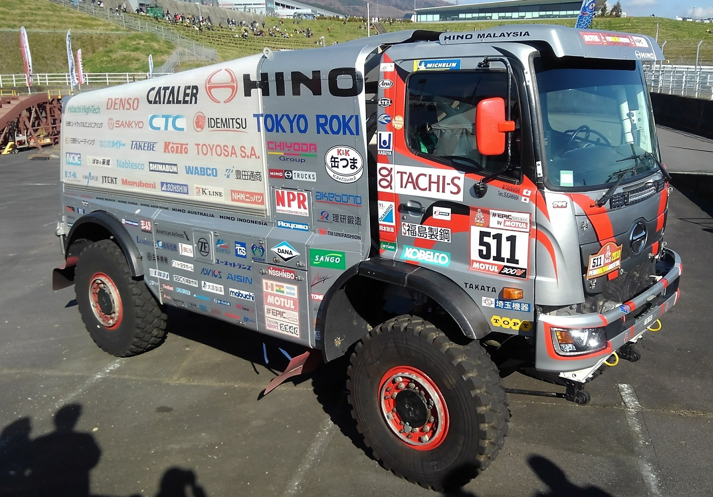 日野チームスガワラの2018年型マシン